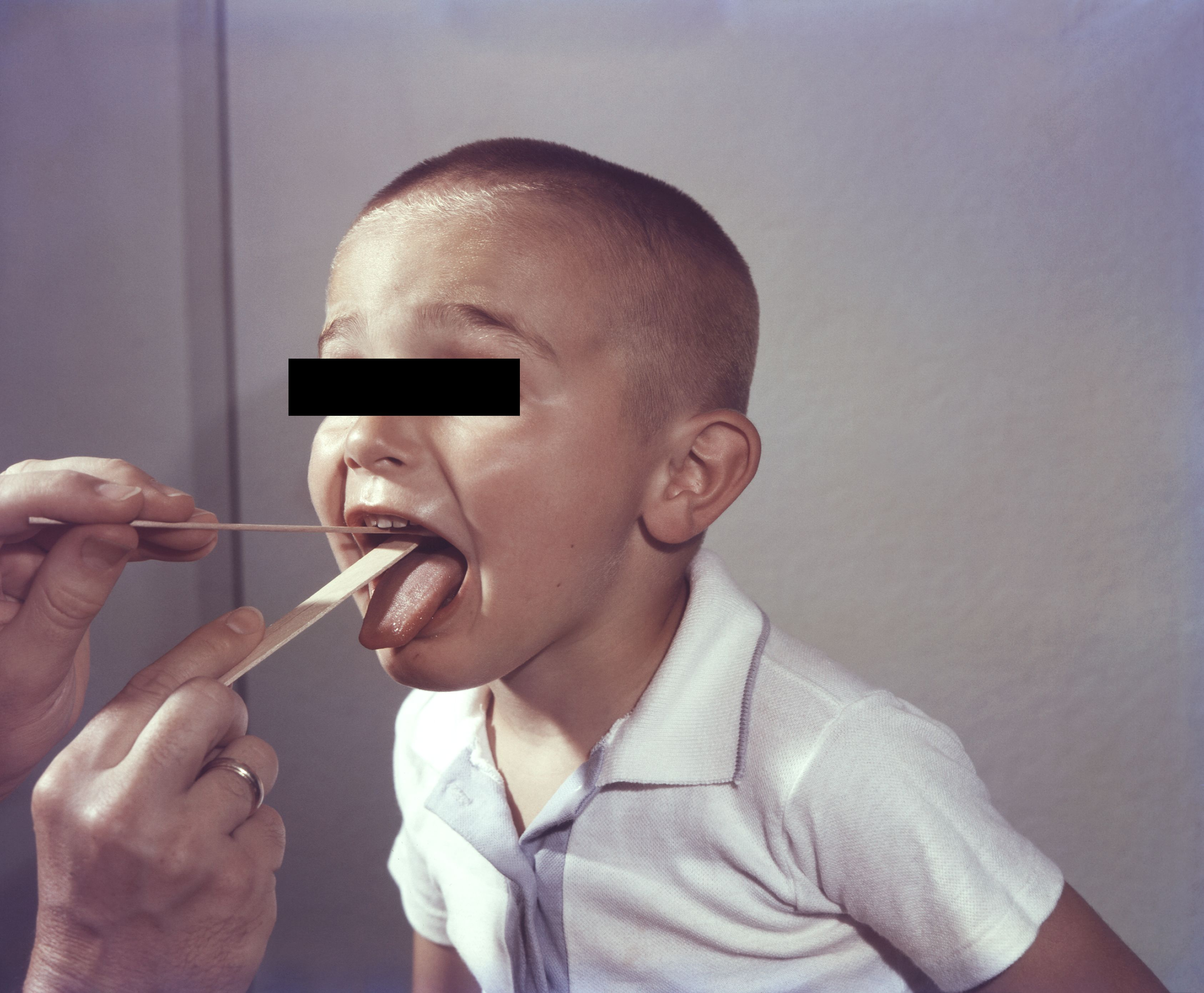 Examen médical clinique de la gorge. Original description This young boy was in the process of being examined by a physician. At this point in the examination, the doctor was taking a throat swab of the boy’s oropharynx in a suspected case of a streptococcal infection, i.e. group A streptococcus (GAS). The physician was also making observations of the boy’s oral cavity and pharynx, checking for erythema, i.e., reddening, and the presence of pus.